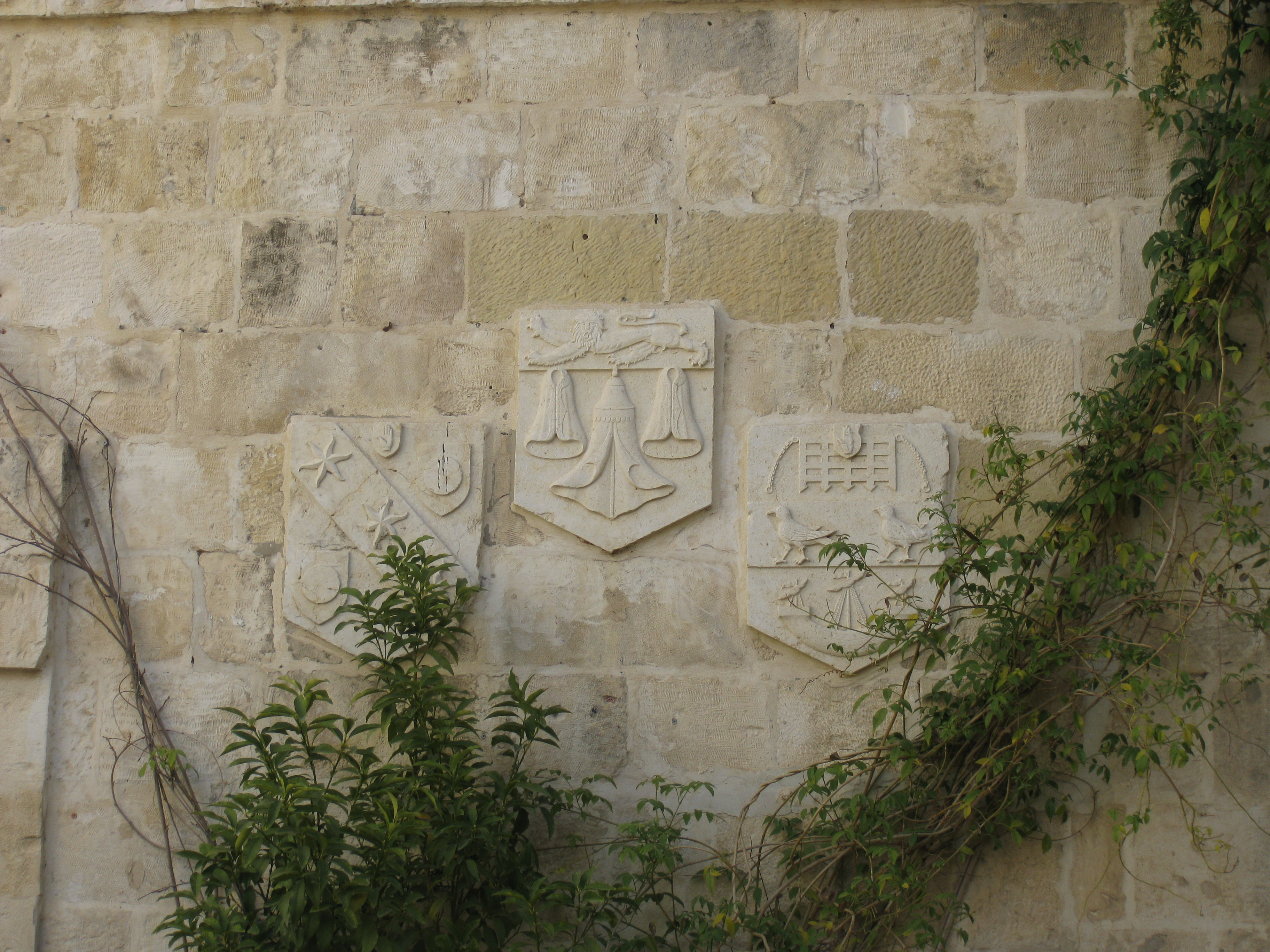 Mount Zion Hotel מלון הר ציון